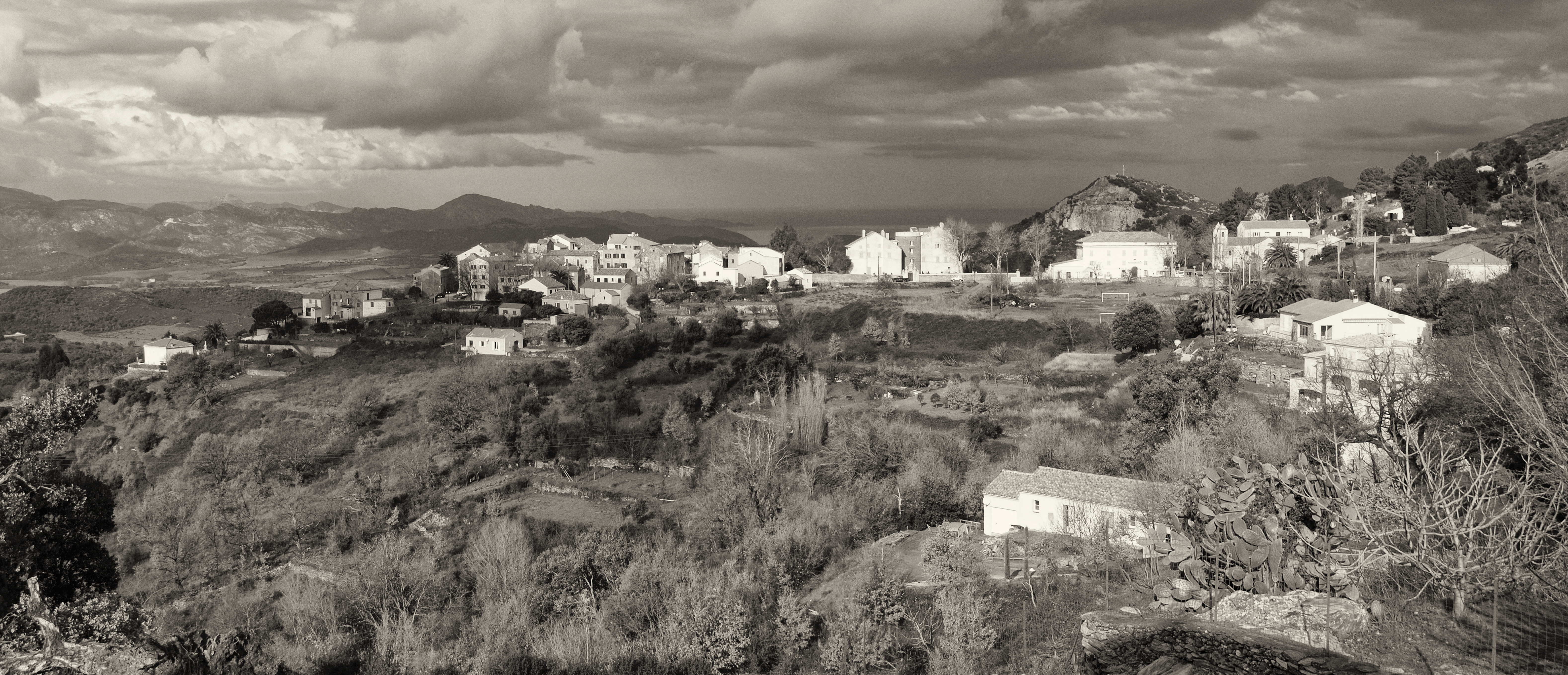 Olmeta-di-Tuda, Nebbio (Corse) - Panorama du village, depuis la chapelle funéraire de Jean Casale